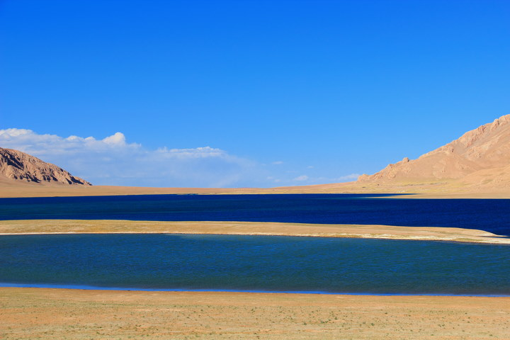 西藏自治区申扎县恰规错